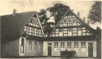 Die Sachsenrast 1912